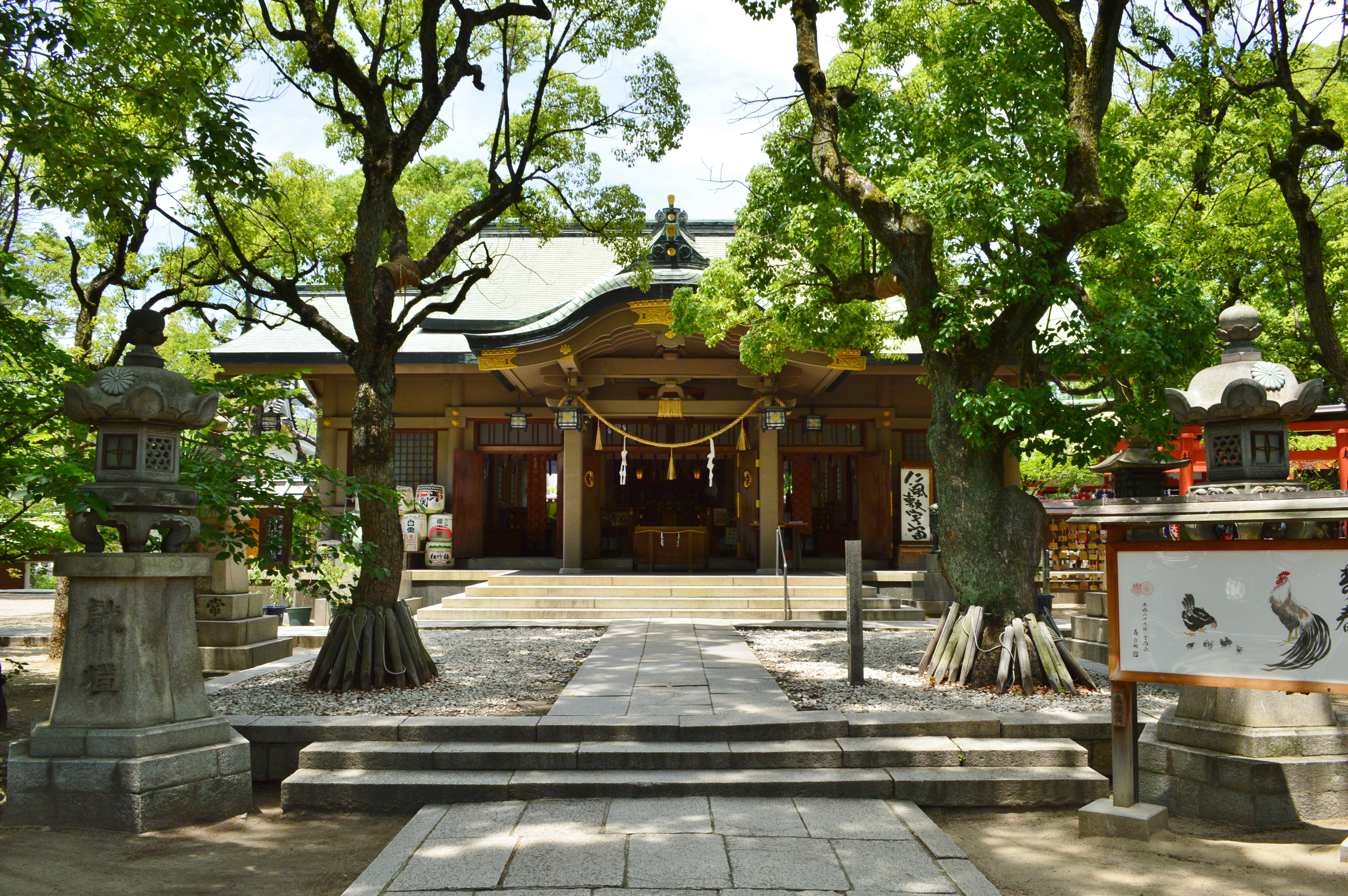 高津宮 拝殿